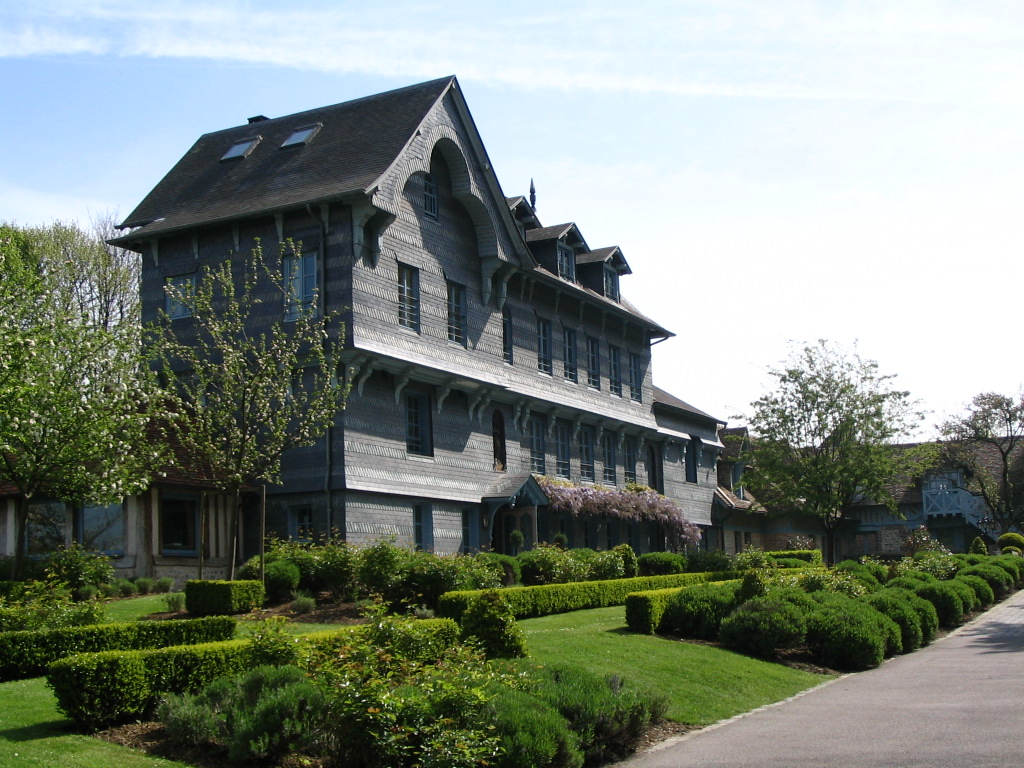 La ferme Saint-Siméon, lieu d'histoire de la peinture, reconverti en hotel-restaurant de luxe, à Honfleur, sur la Seine, en France.